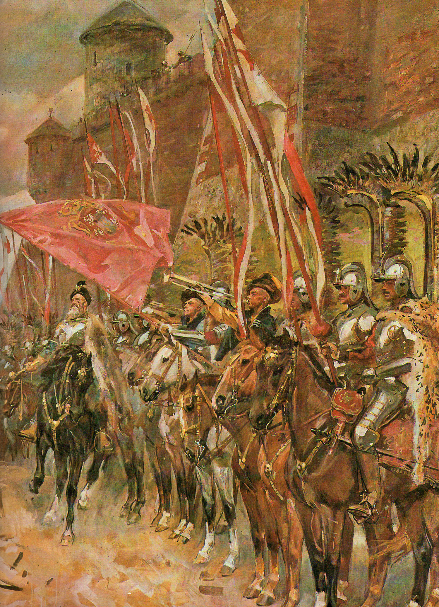 Zolkiewski with husars